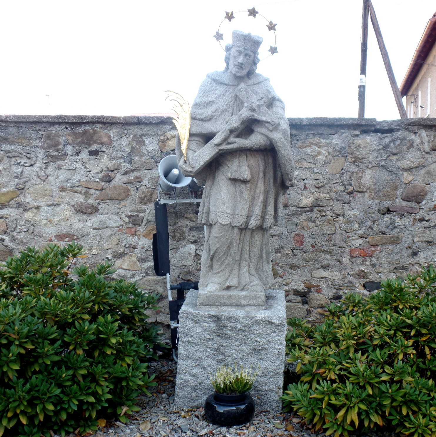 Figura św Nepomucena w Ratnowicach